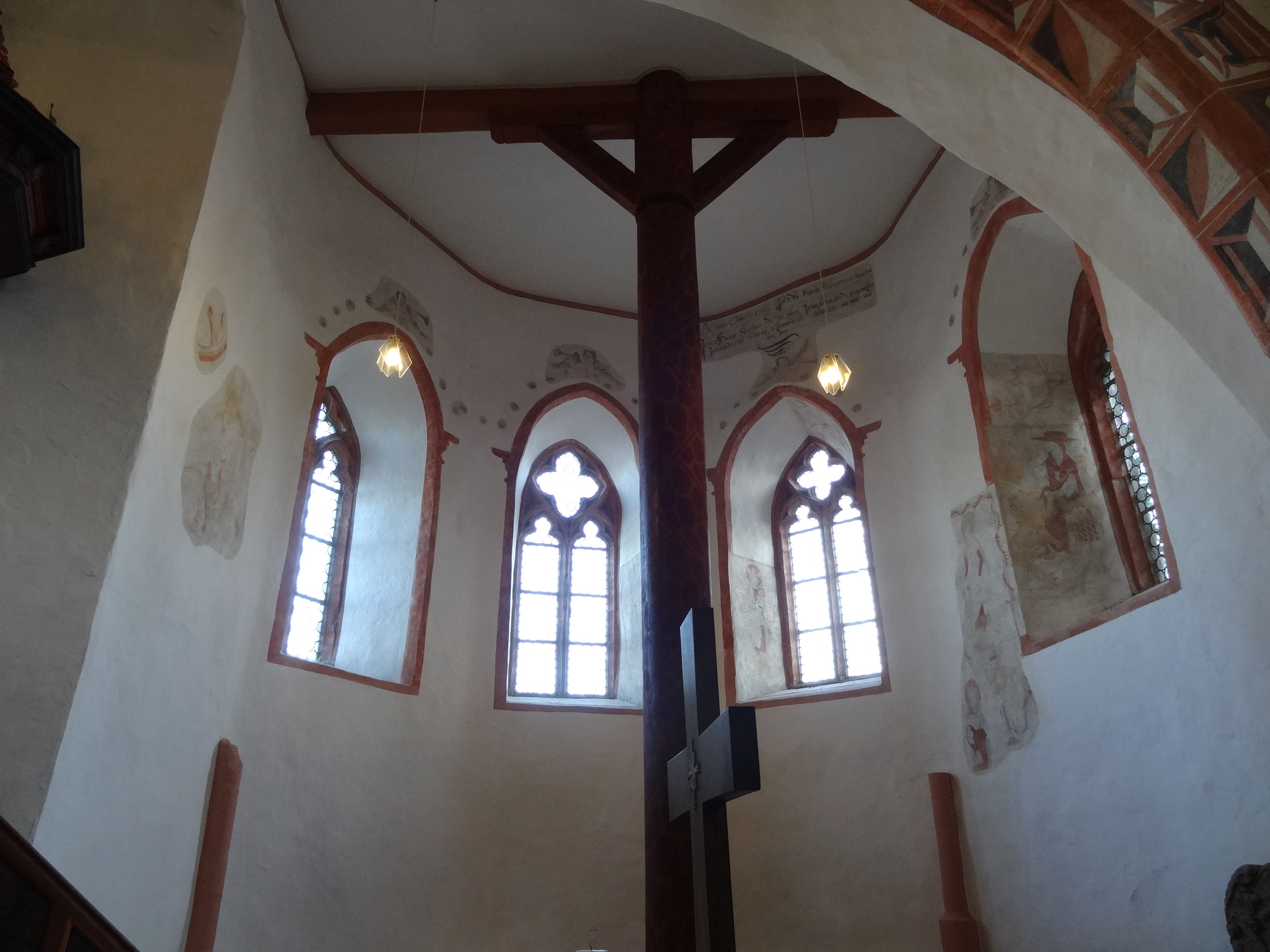 Evangelische Katharinenkirche Gleiberg